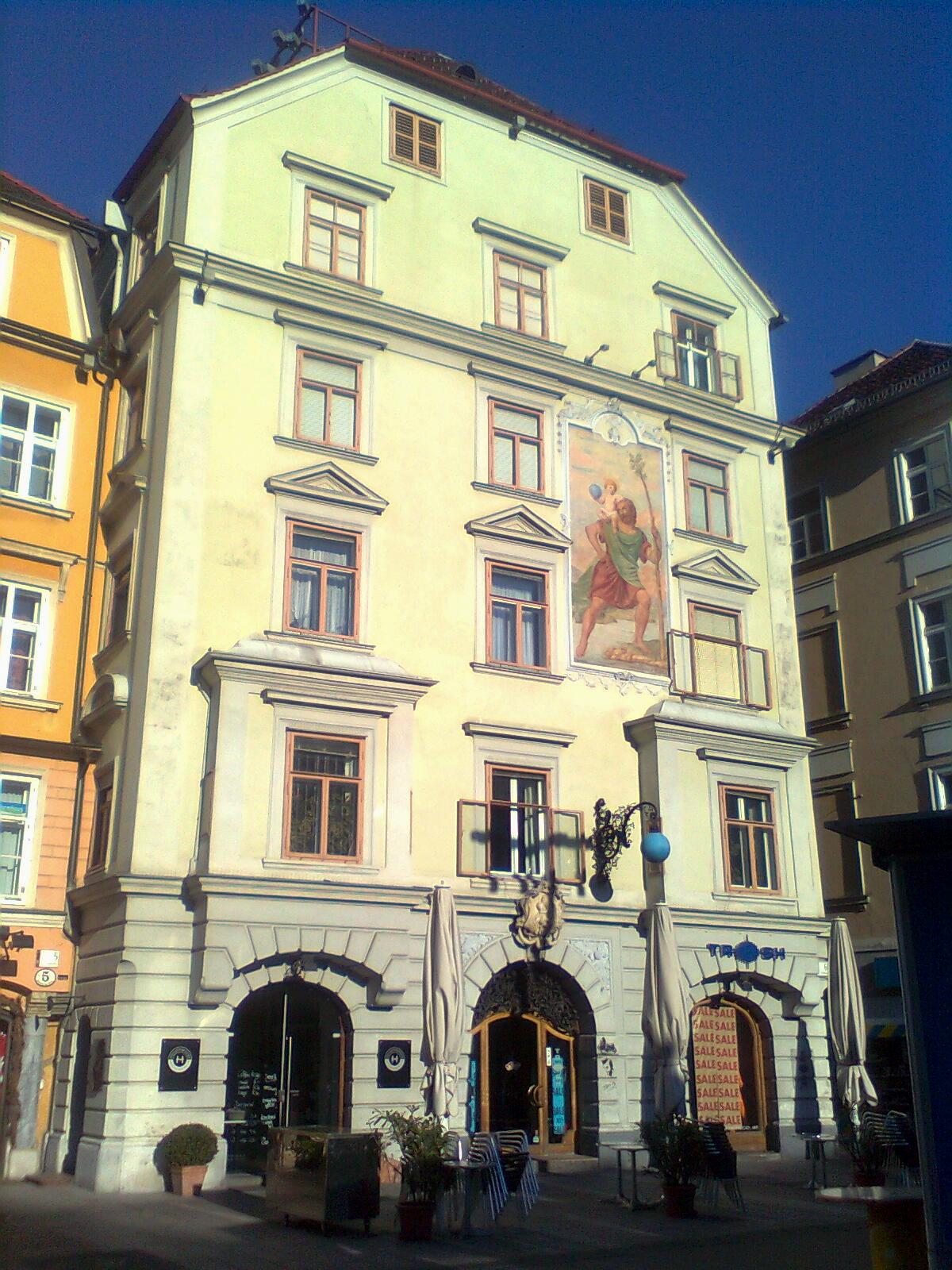 Haus Nummer 6 am Grazer Hauptplatz